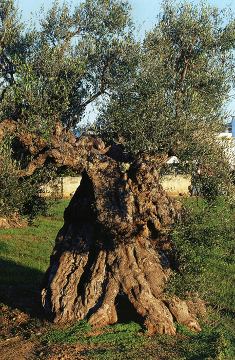 Uno dei pochi ulivi superstiti dell'oliveto in località Linza, citato nella visita pastorale di mons. Ludovico de Pennis del 1452. Potrebbe esser stato piantato dagli stessi fondatori di Alliste.